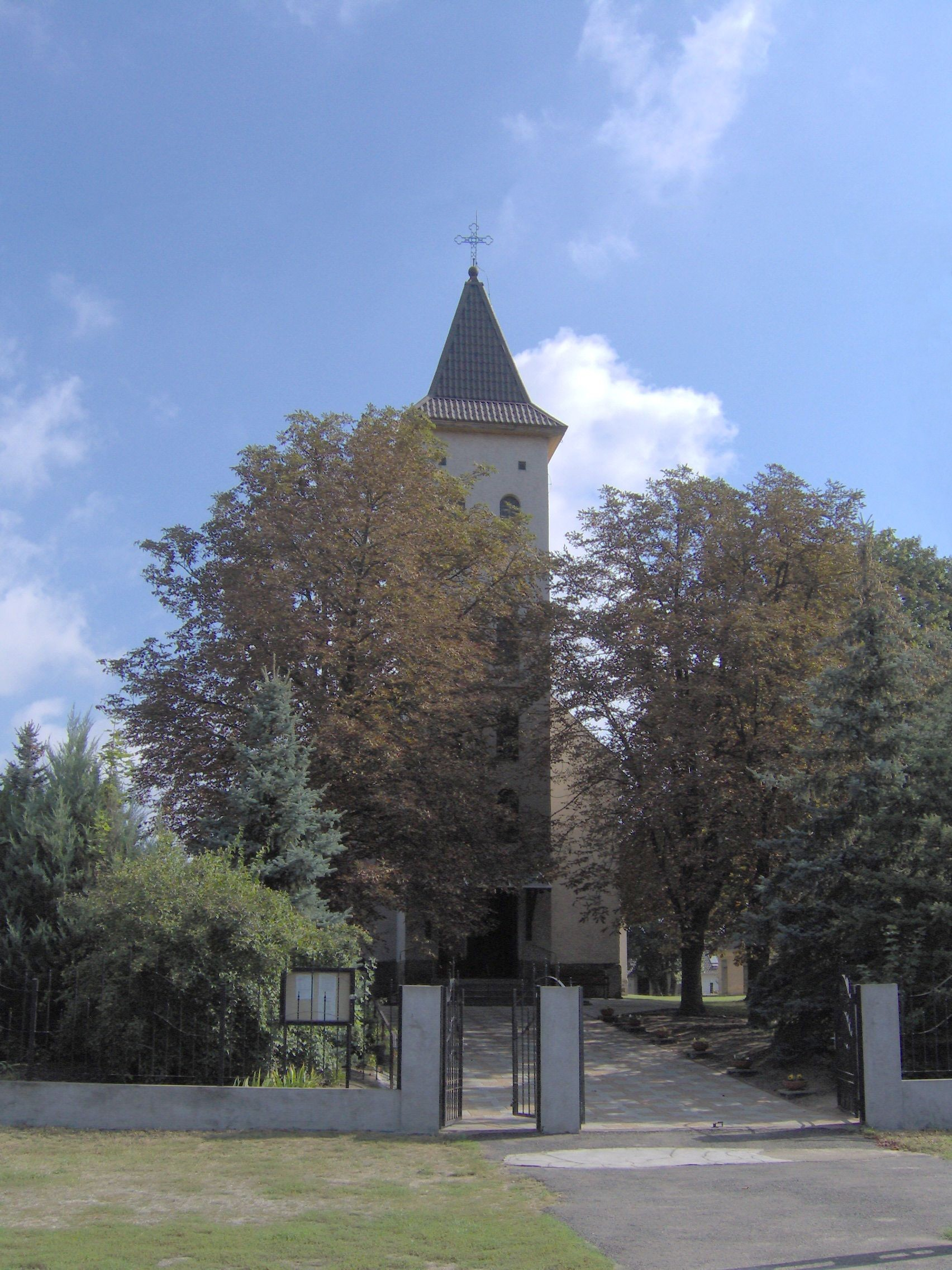 Inárcs, római katolikus templom